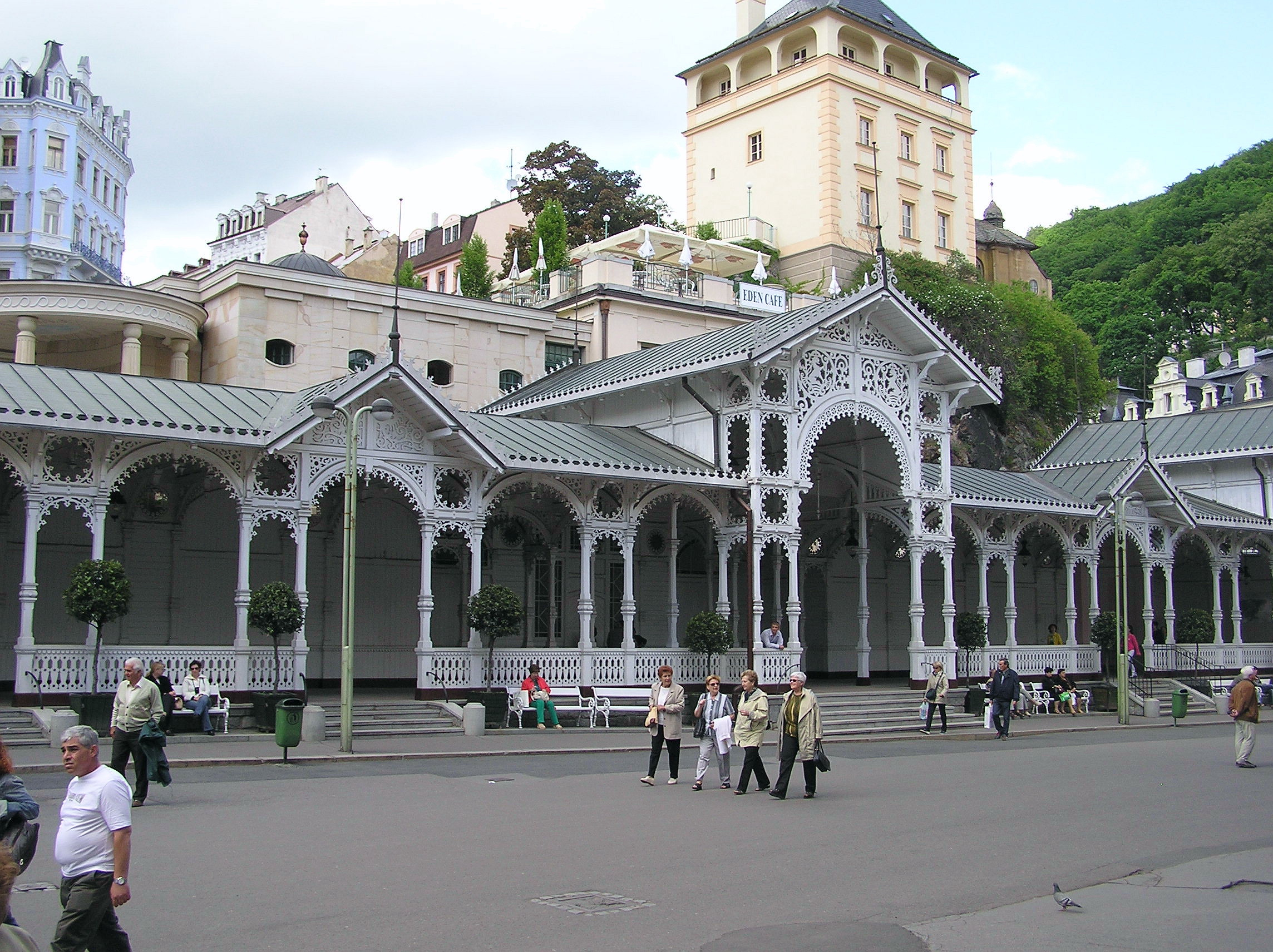 Karlovy Vary (Karlsbad) Marktbrunnkolonnade